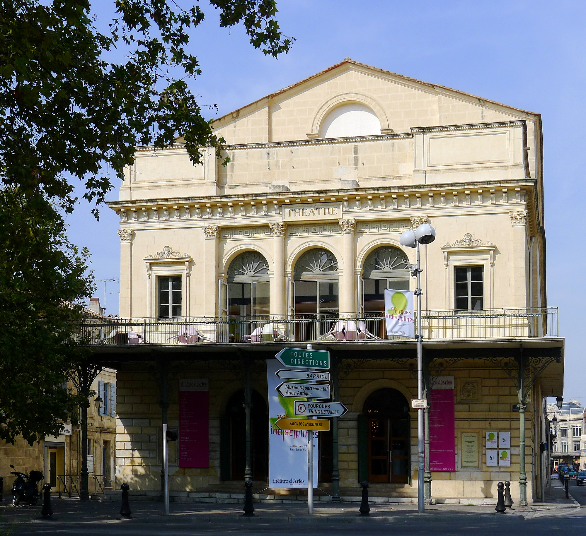 Théâtre municipal - Arles